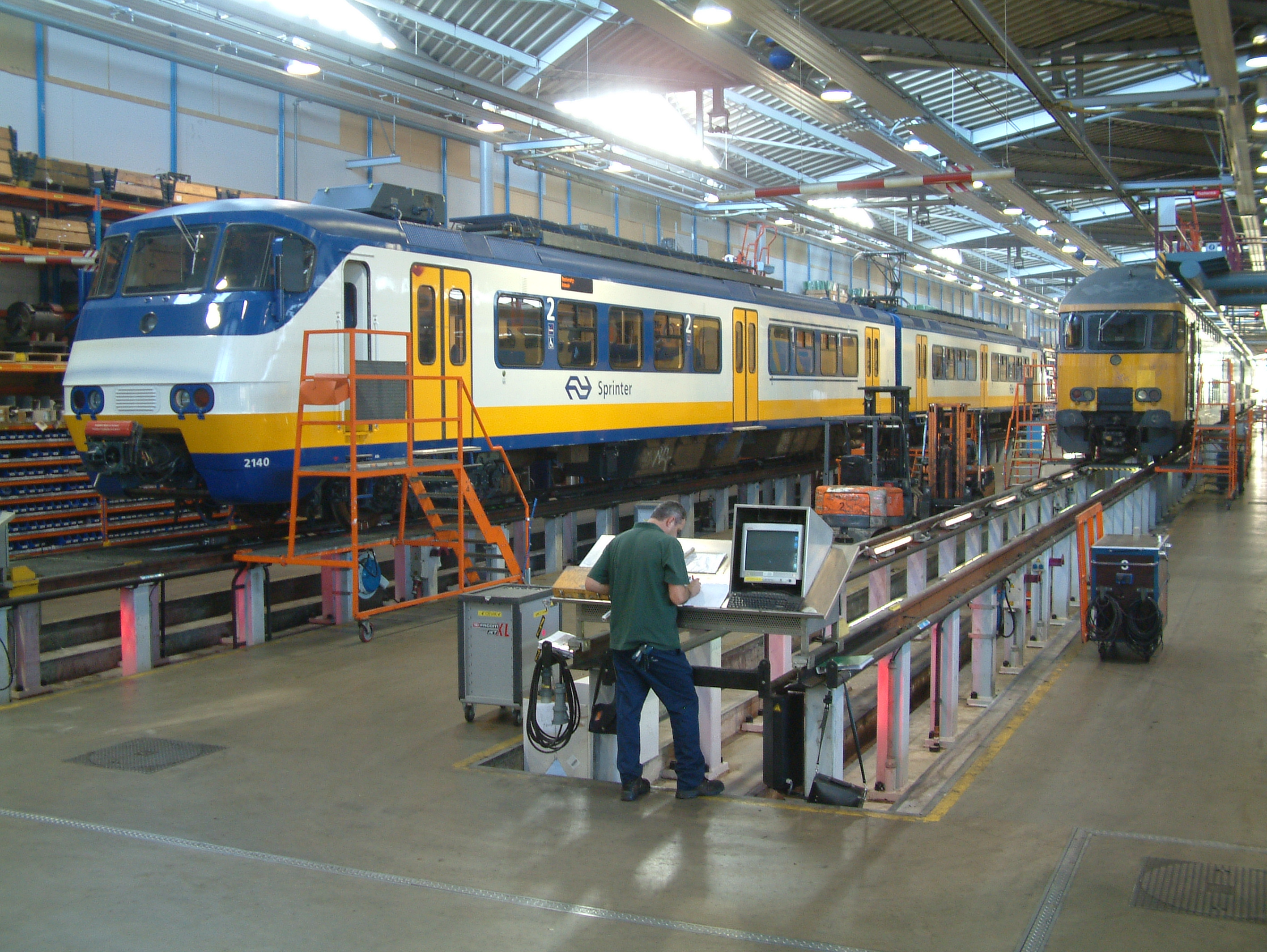 De NedTrain-workshop Leidschendam.